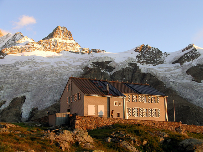 Glecksteinhütte